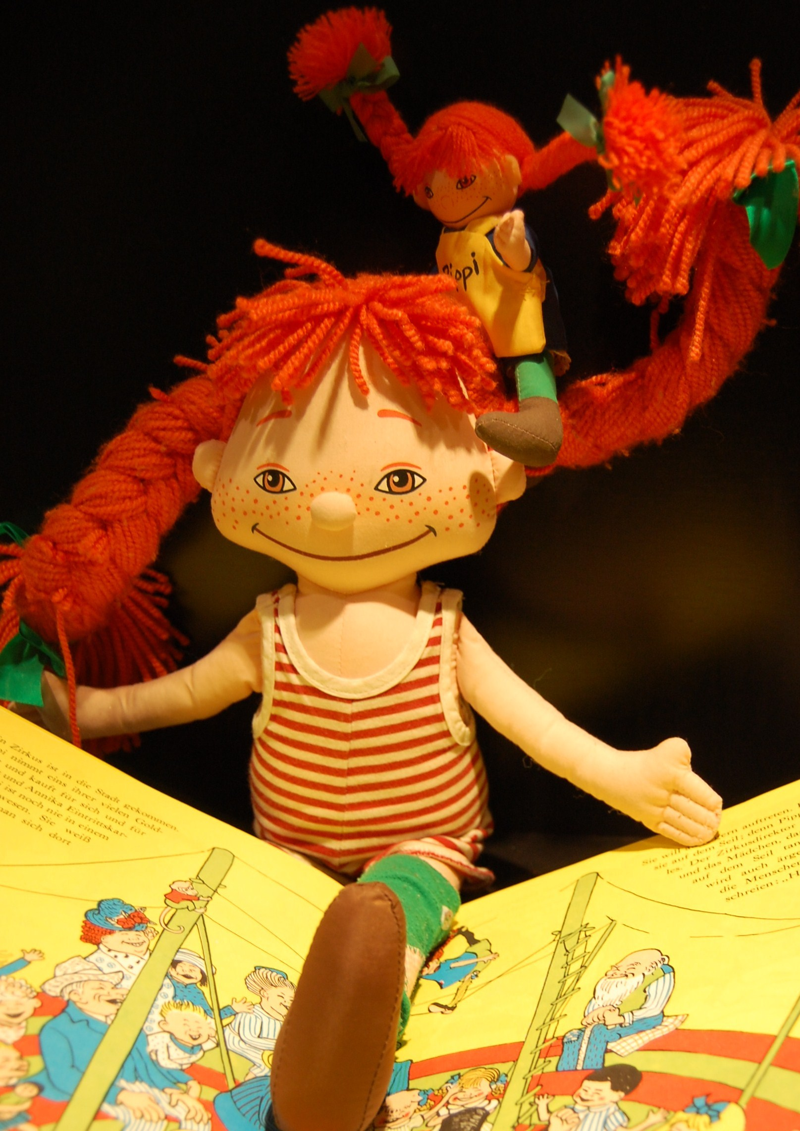 Pippi Langstrumpf als Stoffpuppe; ausgestellt in der "Spielzeugwelt" im Museum Obere Saline (Bad Kissingen)